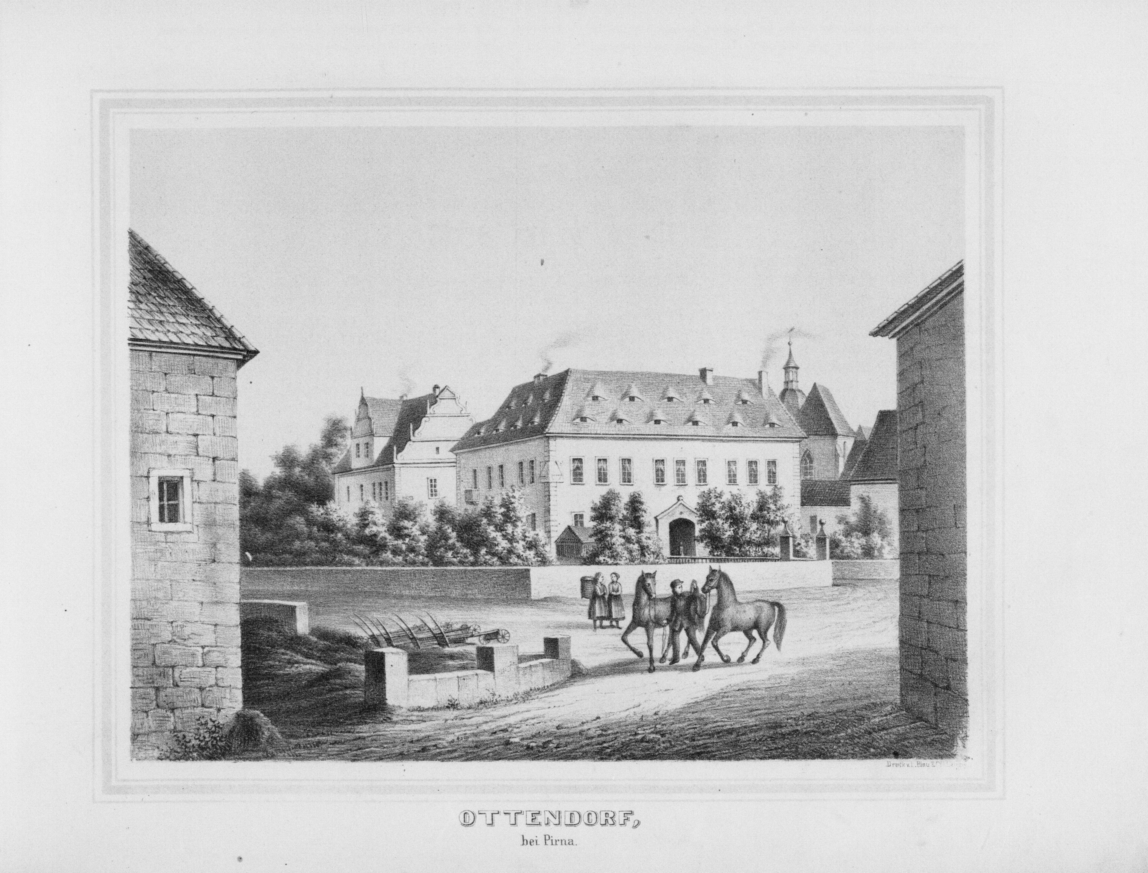 Ottendorf bei Pirna aus: Album der Rittergüter und Schlösser im Königreiche Sachsen Meissner Kreis Section: II